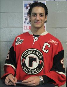 Kevin Marshall à la soirée des détenteurs de billets de saison 2008-09.